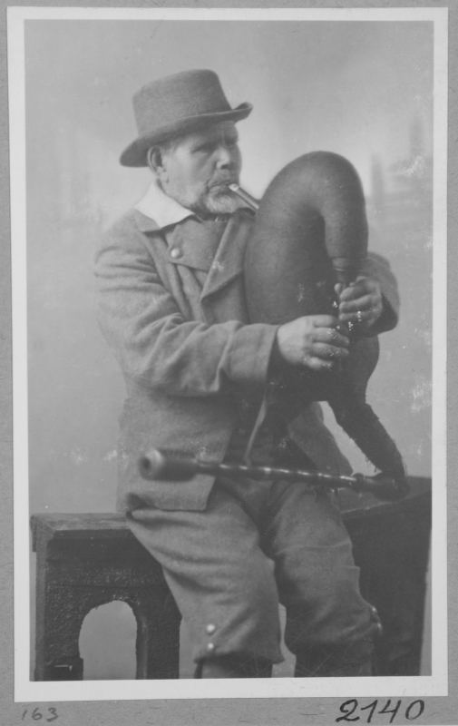 Torupillimängija Juhaan Maaker (1845–1930)